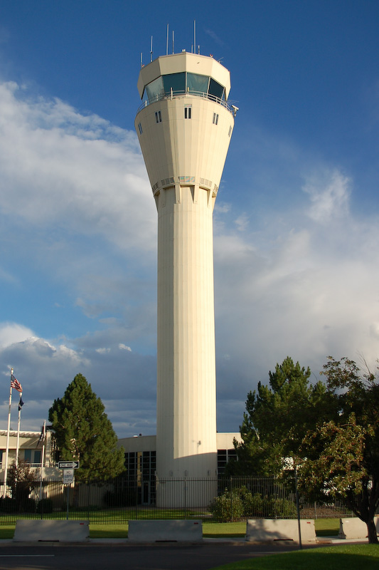 Centennial Airport Tower